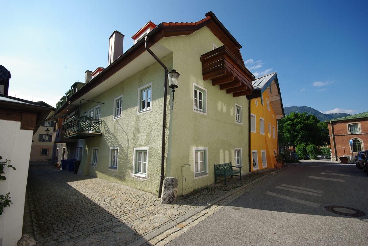 Gruttensteingasse 2, Bad Reichenhall